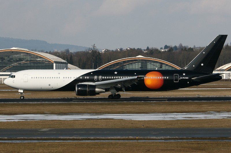 Titan Airways Boeing 767-300 G-POWD in Friedrichshafen, Baden-Württemberg, Germany